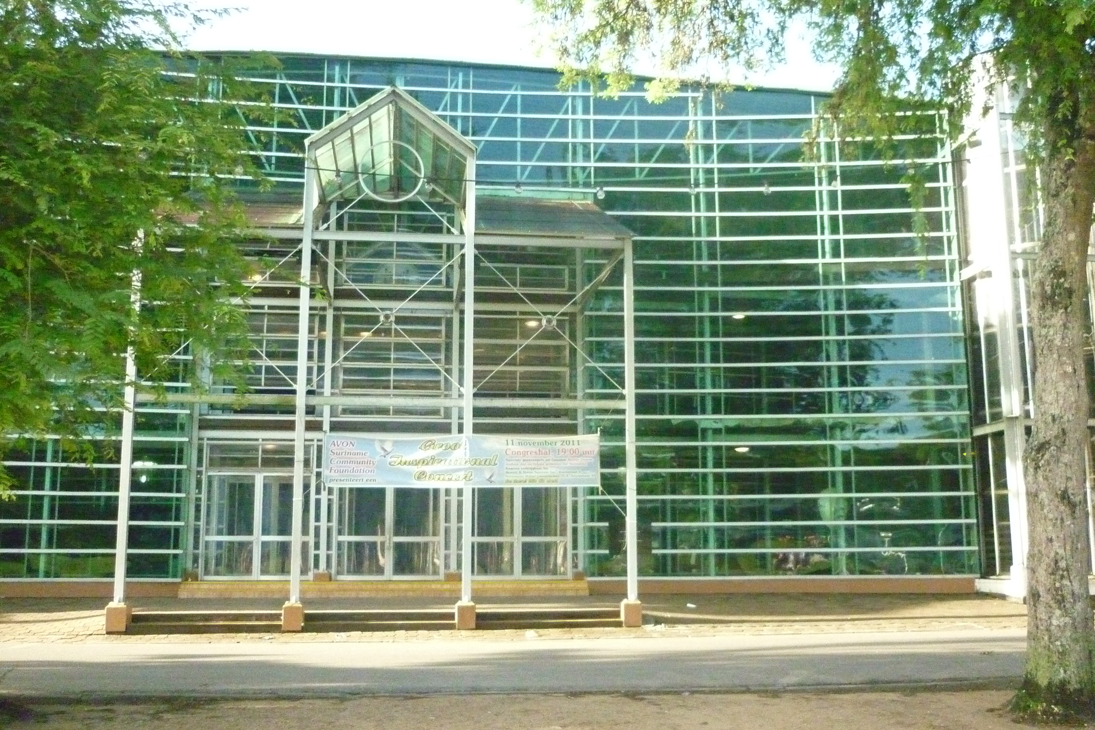 Congreshal in Paramaribo